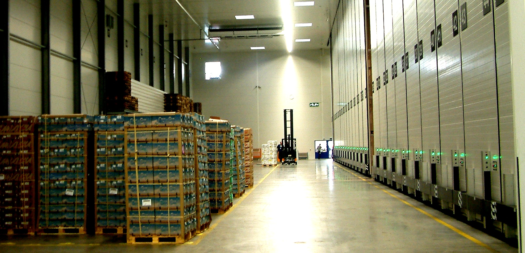 Kühllager für Früchte